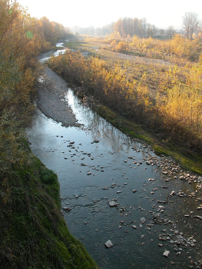 Foto mia personale, il Tidone dal ponte di Pianello, 2007